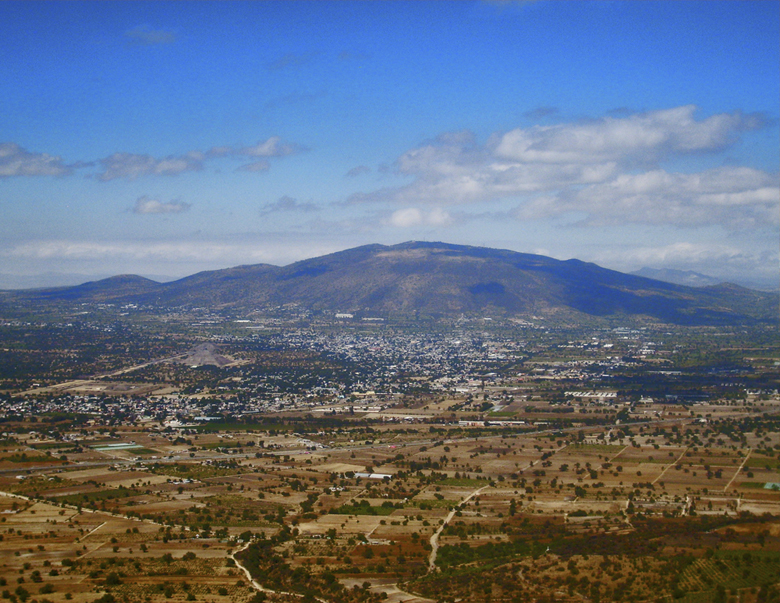 Vista área de San Martín de las Pirámides